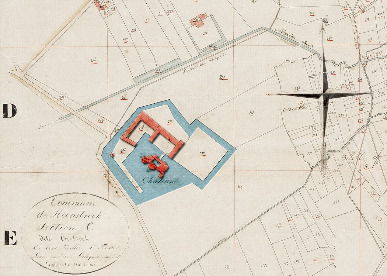 Kadasterkaart Kasteel Hoensbroek (ca 1823)